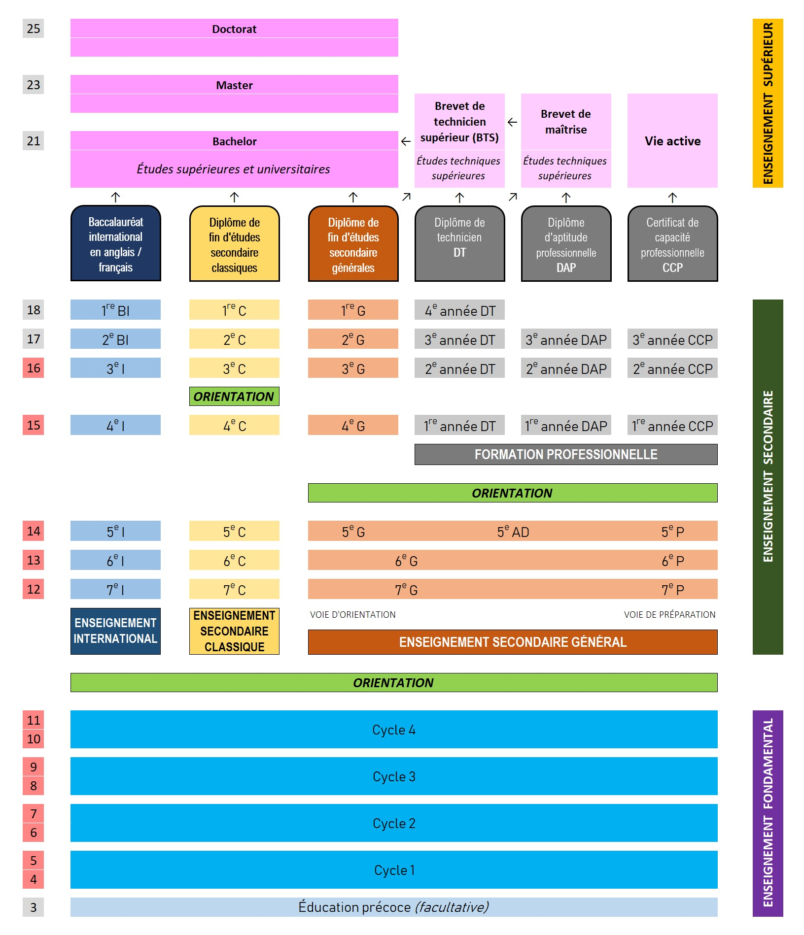 Système éducatif luxembourgeois (à partir de 2018-2019)